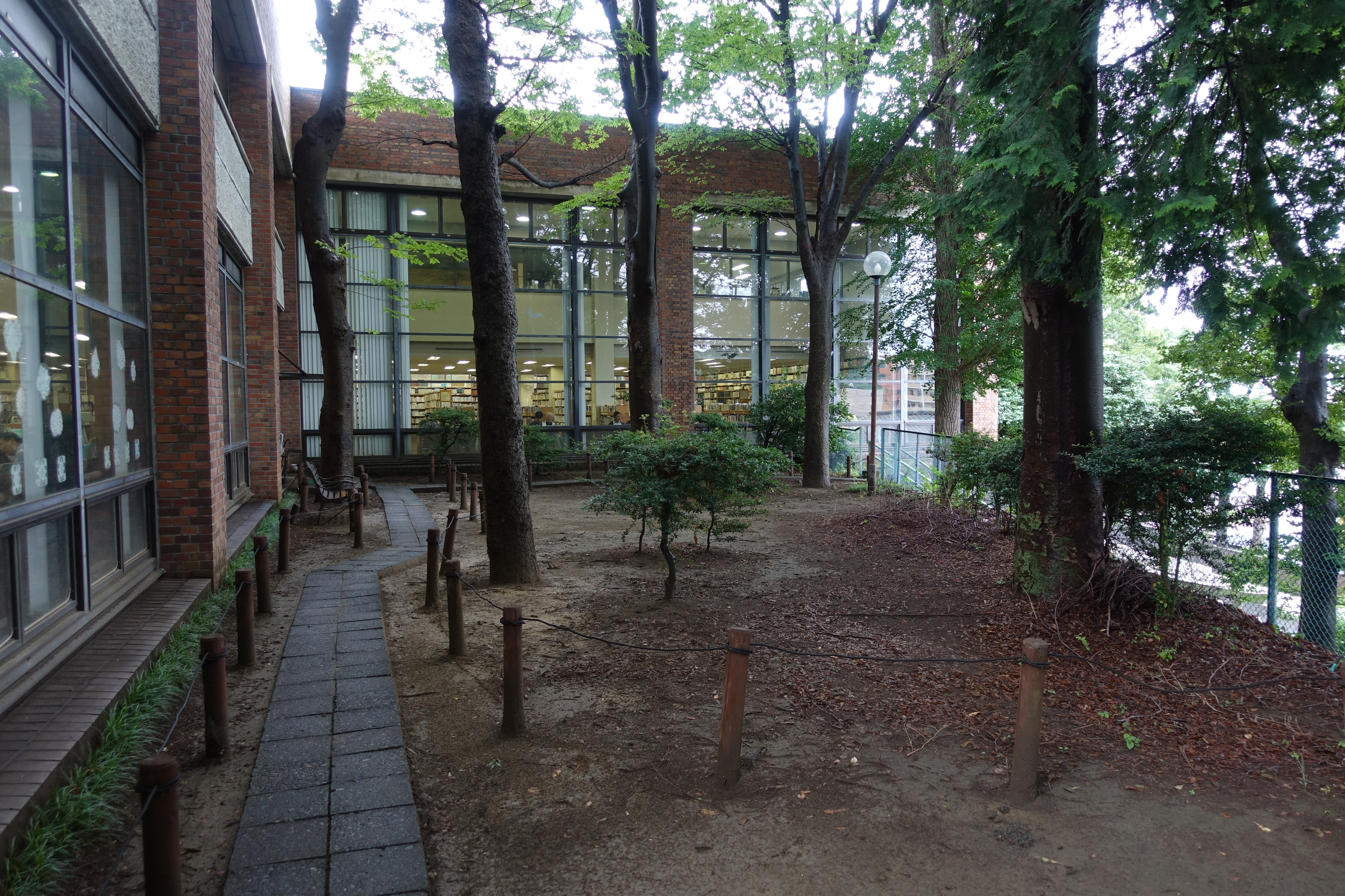 日野市中央図書館の庭外観と庭